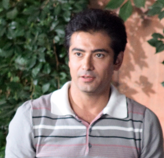 Фархад Махмудов на съёмках фильма "Своя правда"